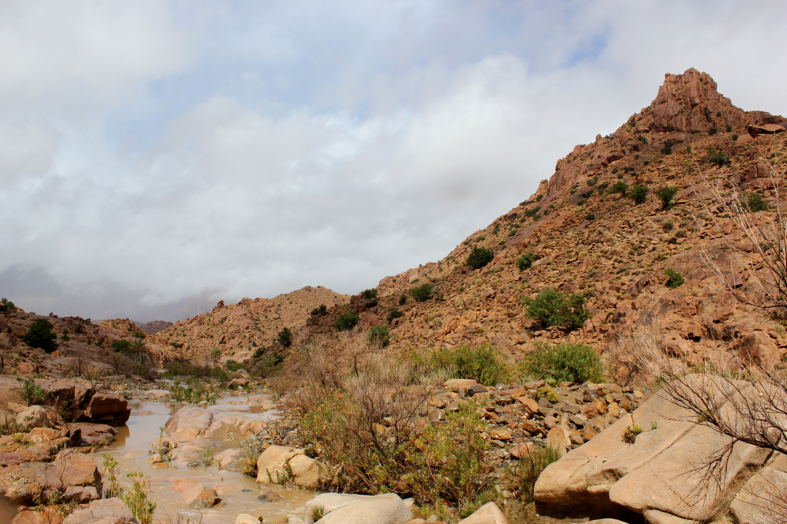 Am Oberlauf des Oued Massa bei Tafraoute, Marokko.Hornjoserbsce: Při hornim běhu rěki Massa blisko Tafraoute, Marokko.